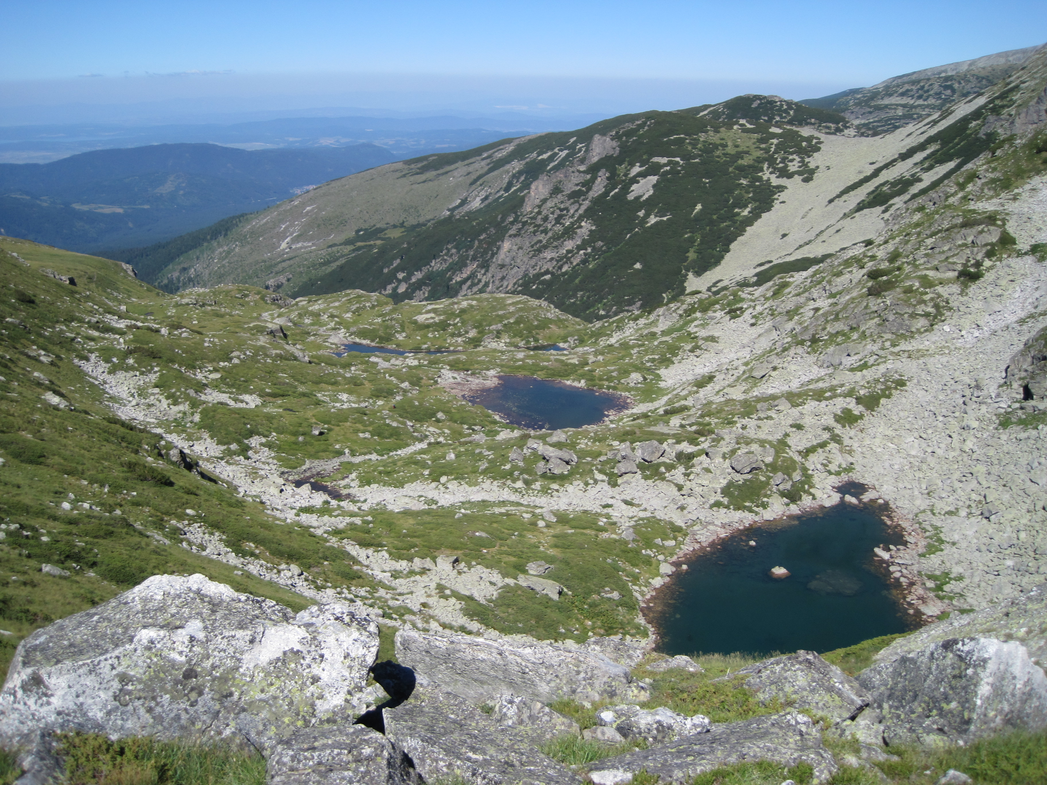 Трите Мальовишки езера